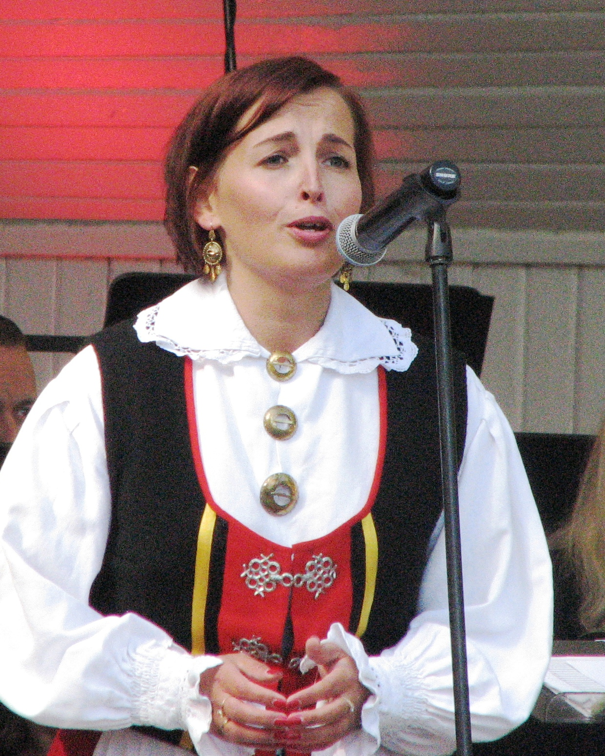 Siiri Koel esinemas Saaremaa Ooperipäevade avakontserdil "Kuressaare 450"